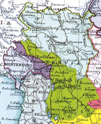 Teritorijalna proširenja Kraljevine Srbije nakon Balkanskih ratova 1913. godine.